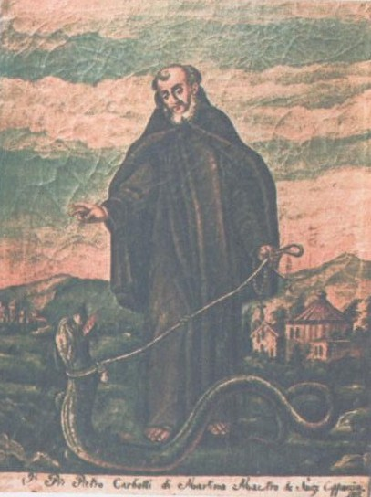 V.P. Pietro Carbotti da Martina